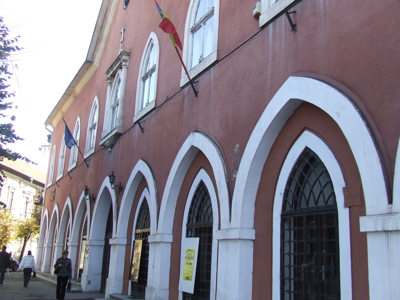 County Museum in Satu Mare, Romania (Muzeul Judeţean Satu Mare)